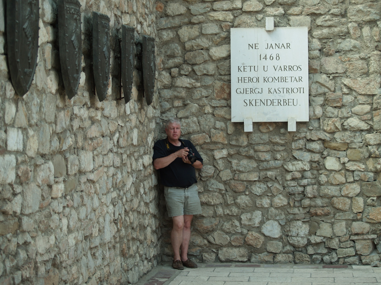 Skanderbeg